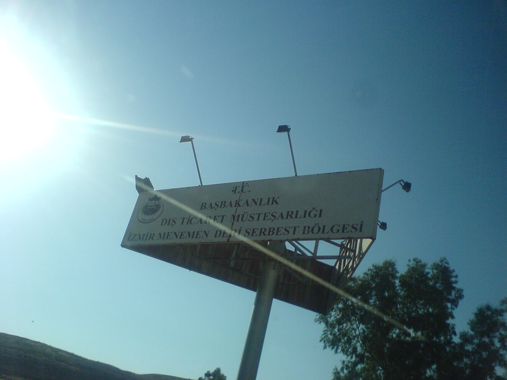 İzmir Menemen Deri Serbest Bölgesi